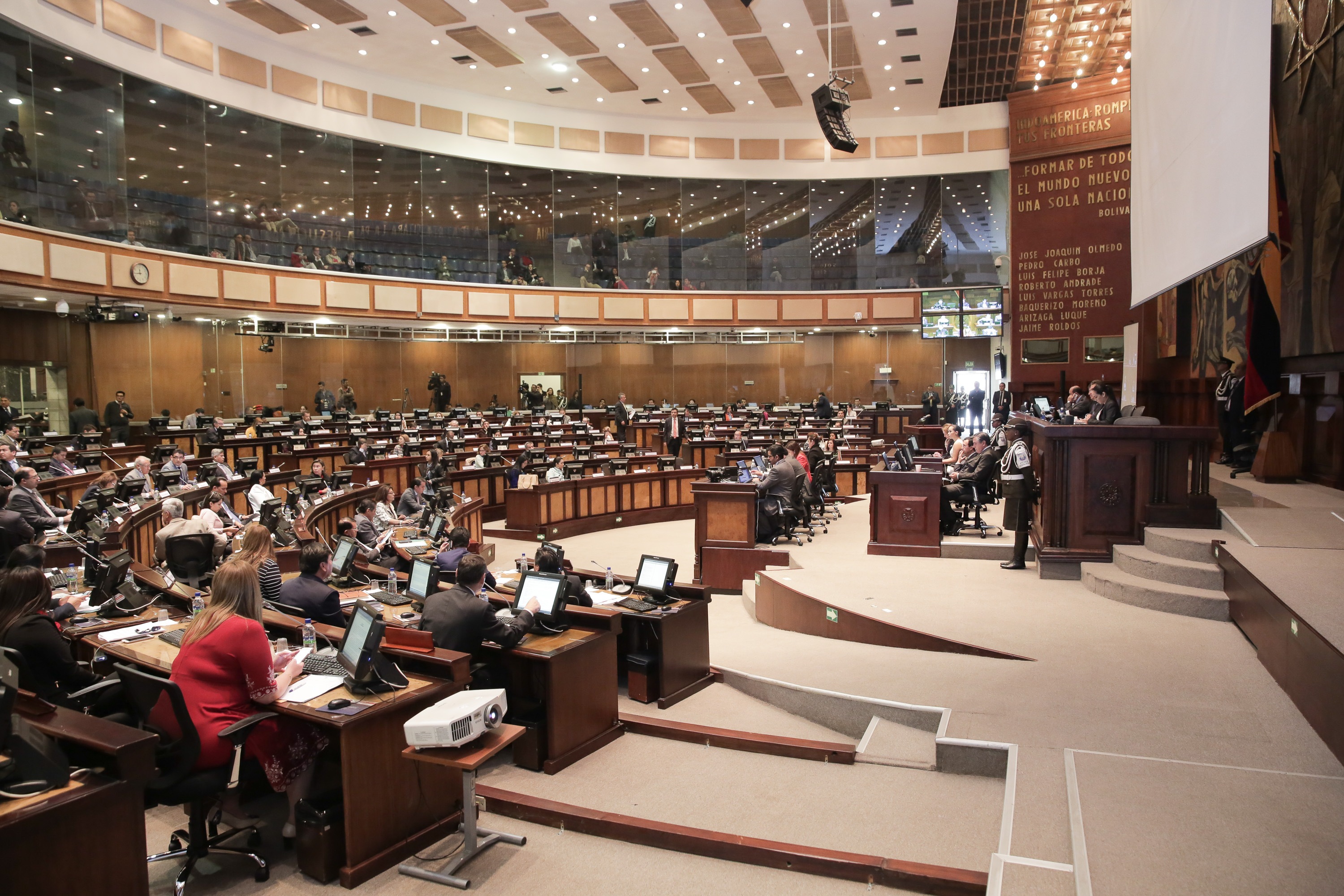 Sesión No.461 del Pleno de la Asamblea Nacional / 20 de junio de 2017 Tema: 1.- Himno Nacional de la República del Ecuador; 2.- Proyecto de Resolución de condena y rechazo ante expresiones racistas y xenofóbicas; y 3.-Objeción Parcial al Proyecto de Código Orgánico Administrativo Fotografía: Alberto Romo/Asamblea Nacional